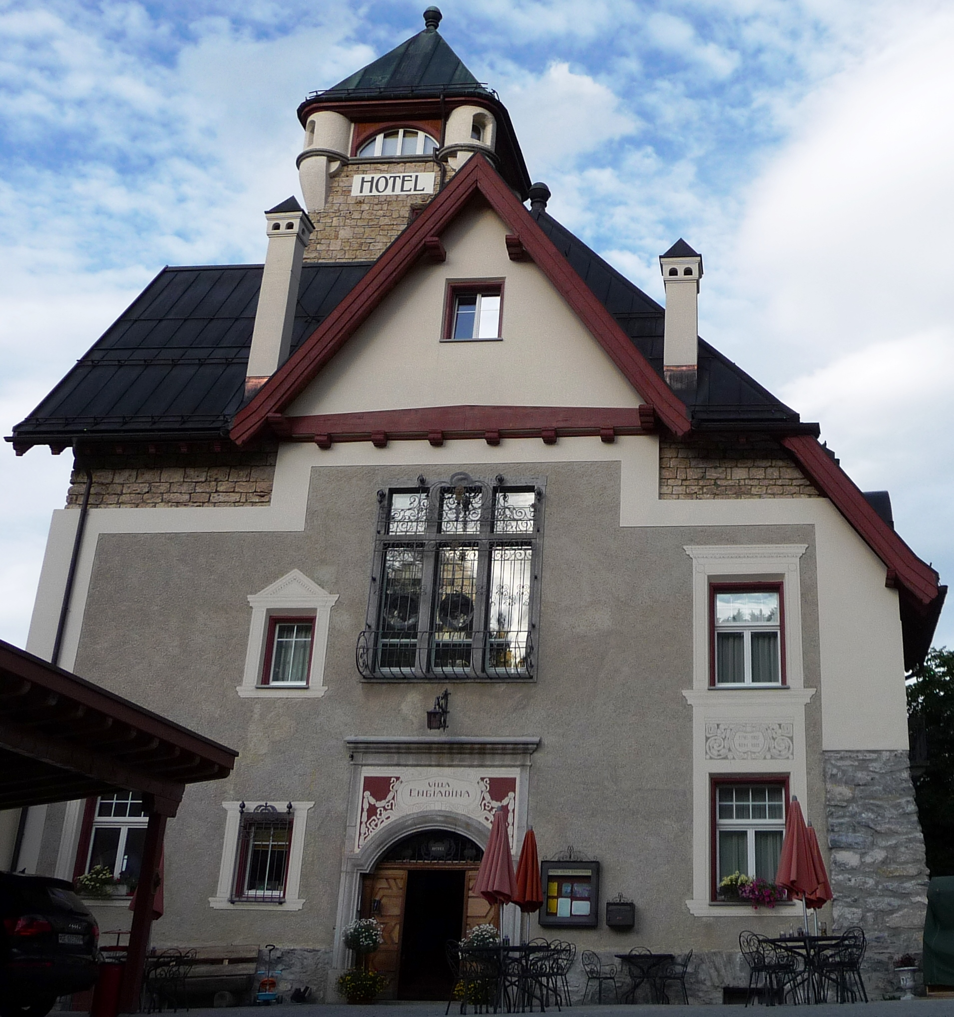 Hotel "Villa Engiadina" in Vulpera (erbaut 1901 durch Karl Gottlieb Koller)